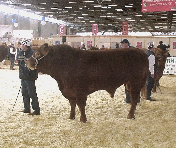 Limousin Bulle auf dem SIMA (Paris) 2007